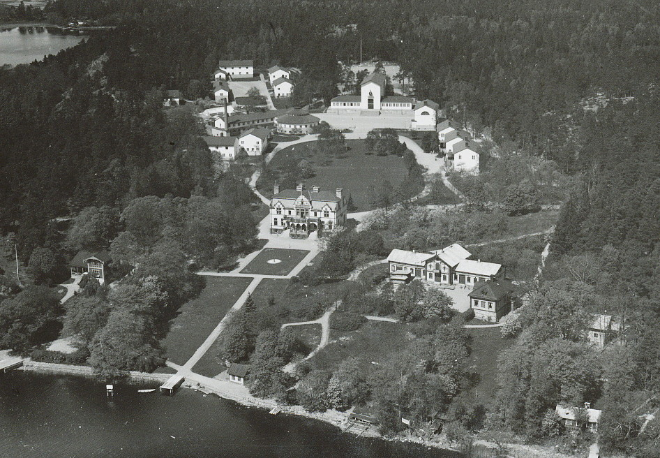 Den Ljunglövska egendomen i Blackeberg, Bromma, Stockholm, med Frimurarbarnhuset i bakgrunden.